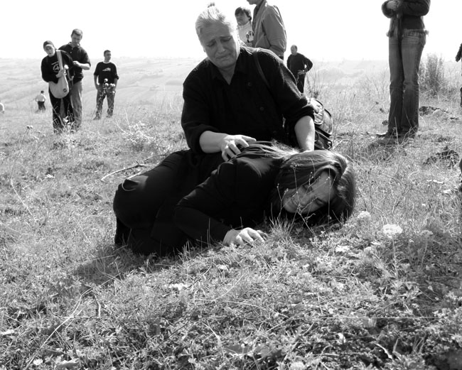 Косово и Метохија: Српкиње оплакују своје мужеве и синове који су албански терористи киднаповали у селима Оптеруша и Ретимље и ублили их у логору Клечка 1998. године.Фотографије из пројекта "Корени душе". Фото:Дарко Дозет